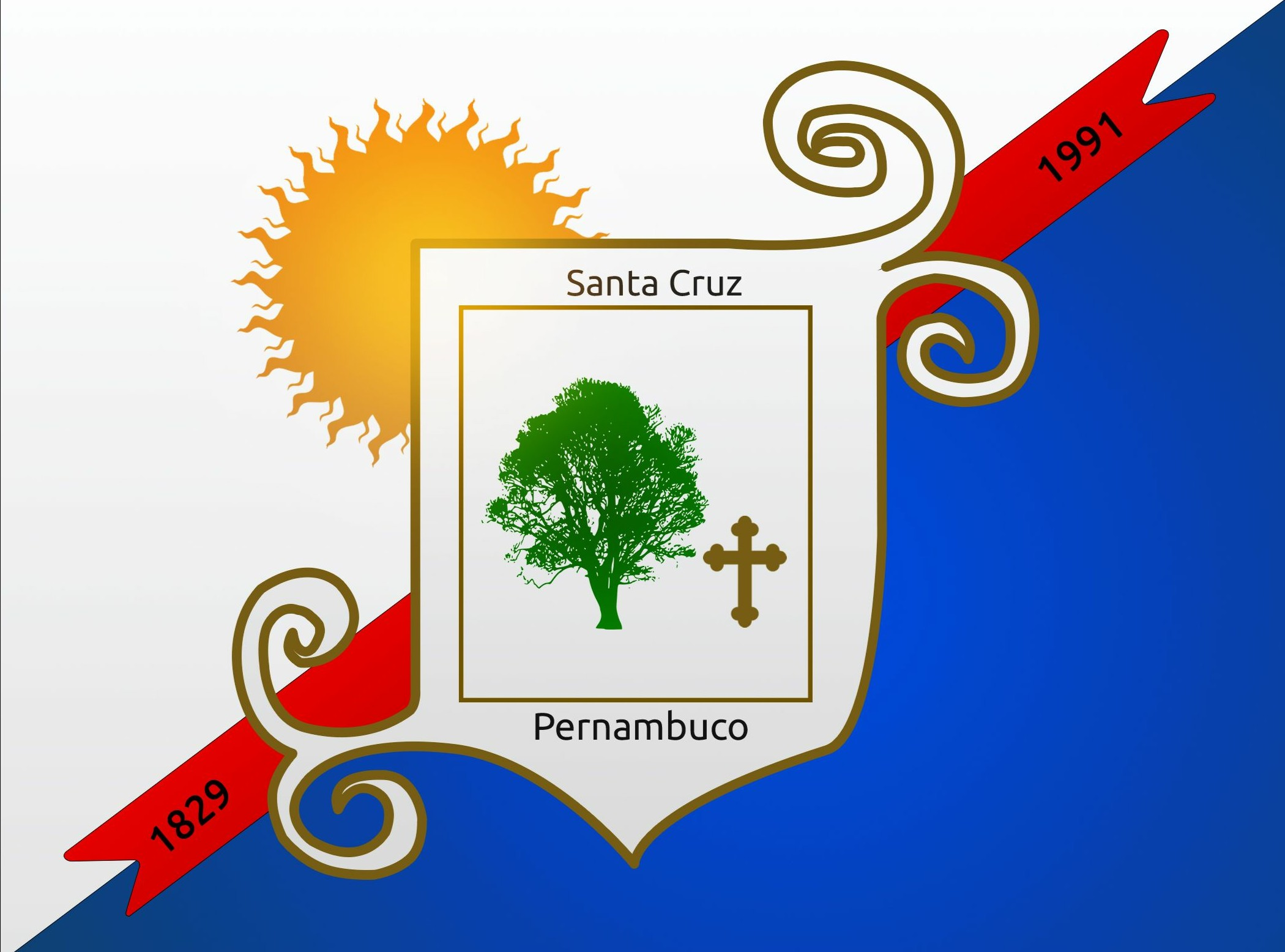 Bandeira do Município de Santa Cruz PE